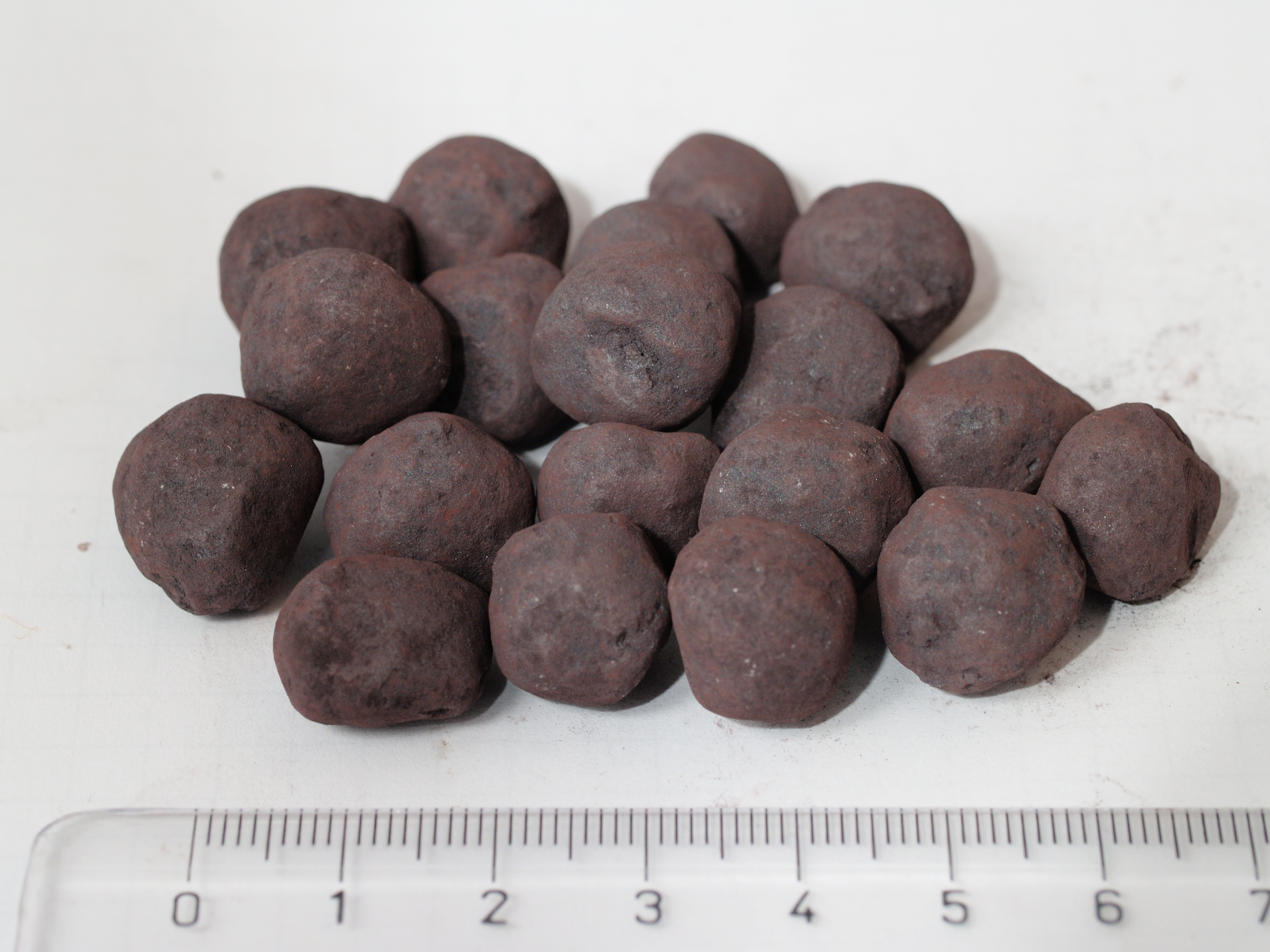 Eisenerzpellets mit Maßstab, Ursprung Kiruna (Schweden)